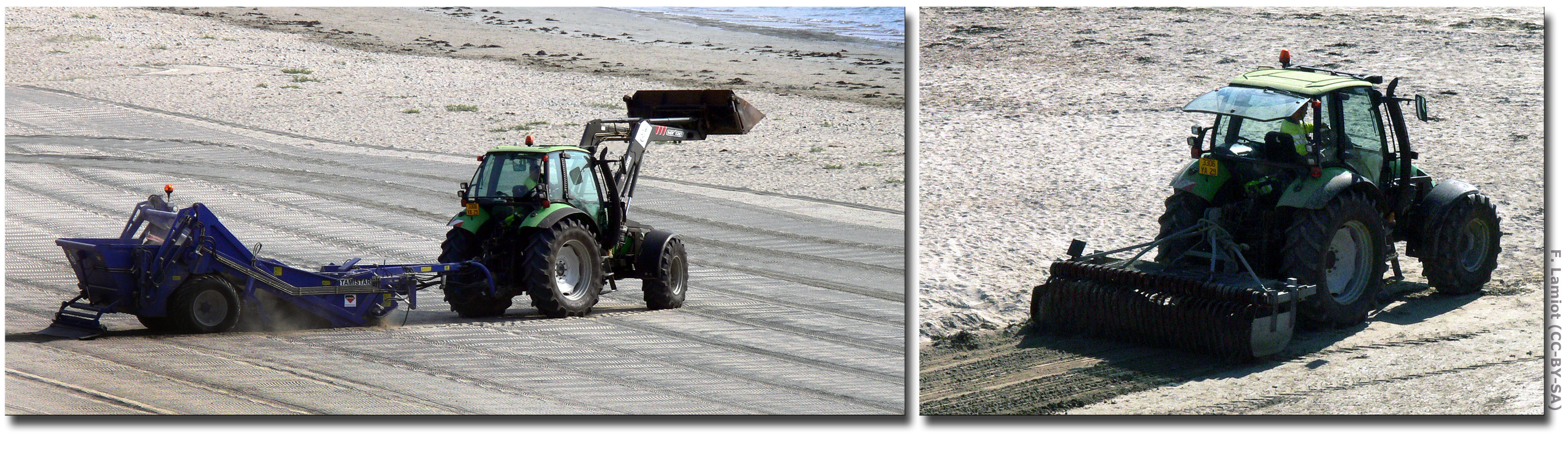 Engins de nettoyage des laisses de mer et déchets sur plage fréquentée par les touristes. Photo prise en Baie de Douarnenez à Morgat, Finistère, Bretagne, ouest de la France, Europe). Il existe une forte pression pour nettoyer mécaniquement les laisses de mer afin d'offrir aux touristes des plages "propres". Cela semble utile là où des pullulations anormales d'algues vertes se produisent en raison d'une eutrophisation ou dystrophisation induite par les apports à la mer des excès de nitrates et phosphates agricoles ou émis par les stations d'épuration. Une autre source de risque, localement peut être constituée des nitrates issus de munitions immergées, les quelles peuvent également perdre des toxiques de combat de type Ypérite, Chloropicrine, etc. (L'ypérite a la consistance et l'apparence de petites galettes de pétrole lorsqu'elle fuit d'obus percés par la corrosion et qu'elle est apporté sur l'estran par les courants. Du point de vue du développement soutenable, il convient cependant de préserver la partie naturelle des laisses de mer, tout particulièrement aux pieds des dunes qu'elles contribuent à fixer.